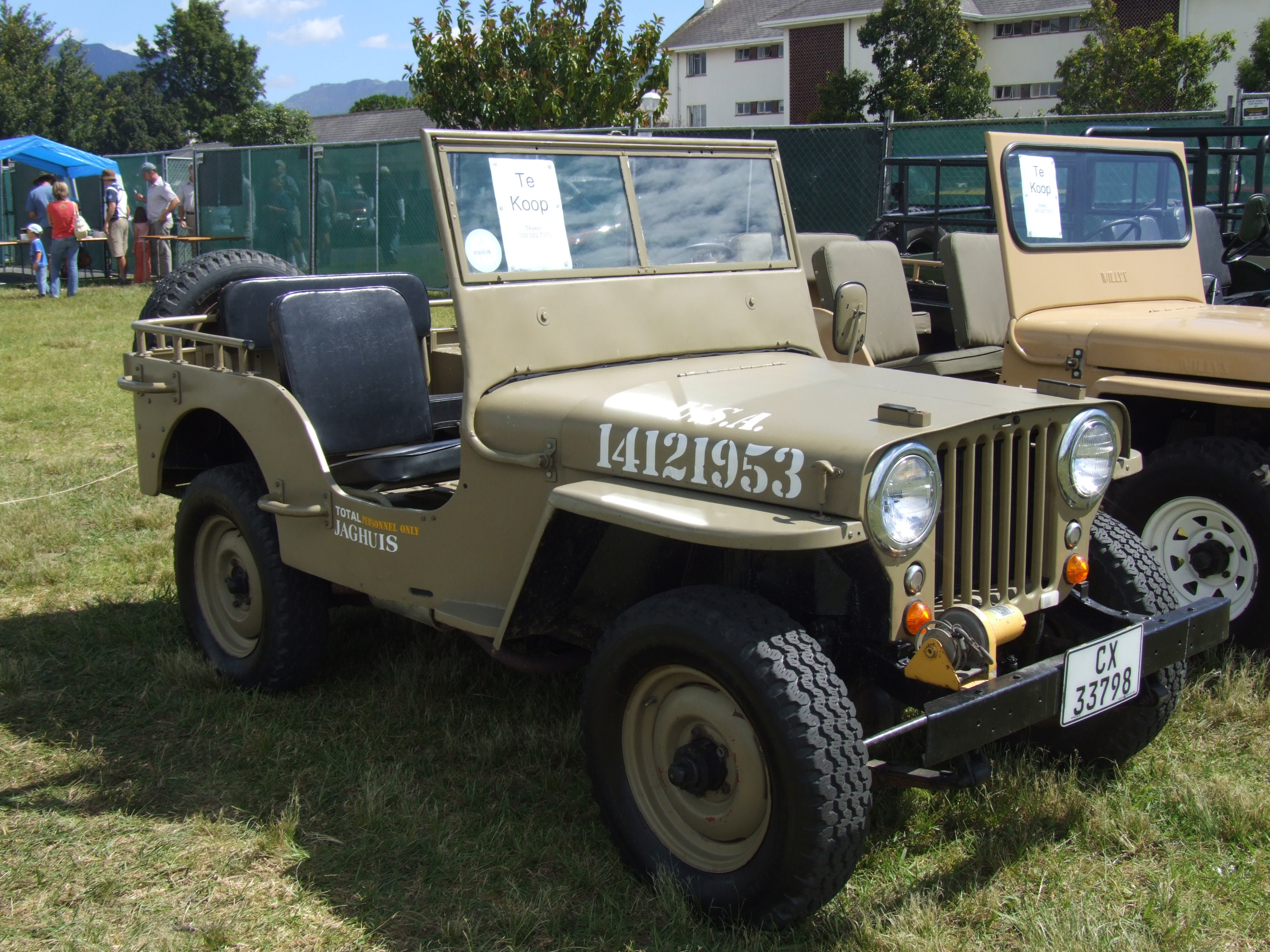 Jeep 2